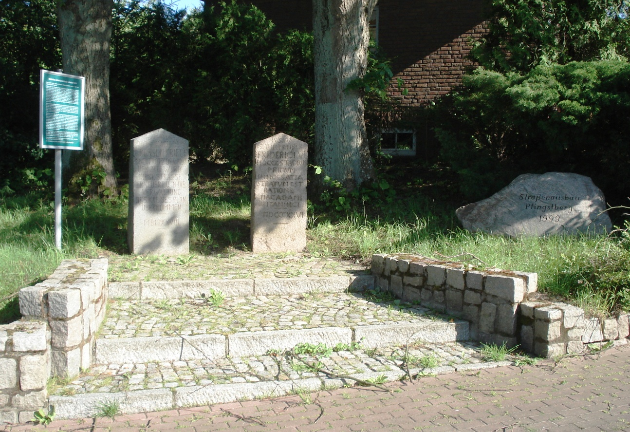 Macadam-Straße_Pfingstberg_-_Erinnerungsstaette